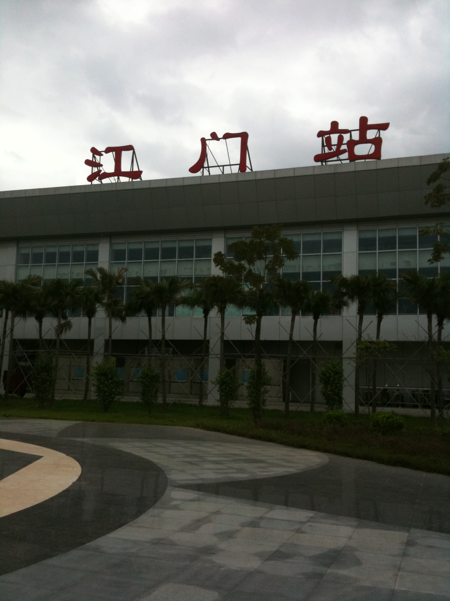 江门站